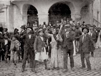 Paro general de trabajadores en Lima, Perú, mayo de 1919.